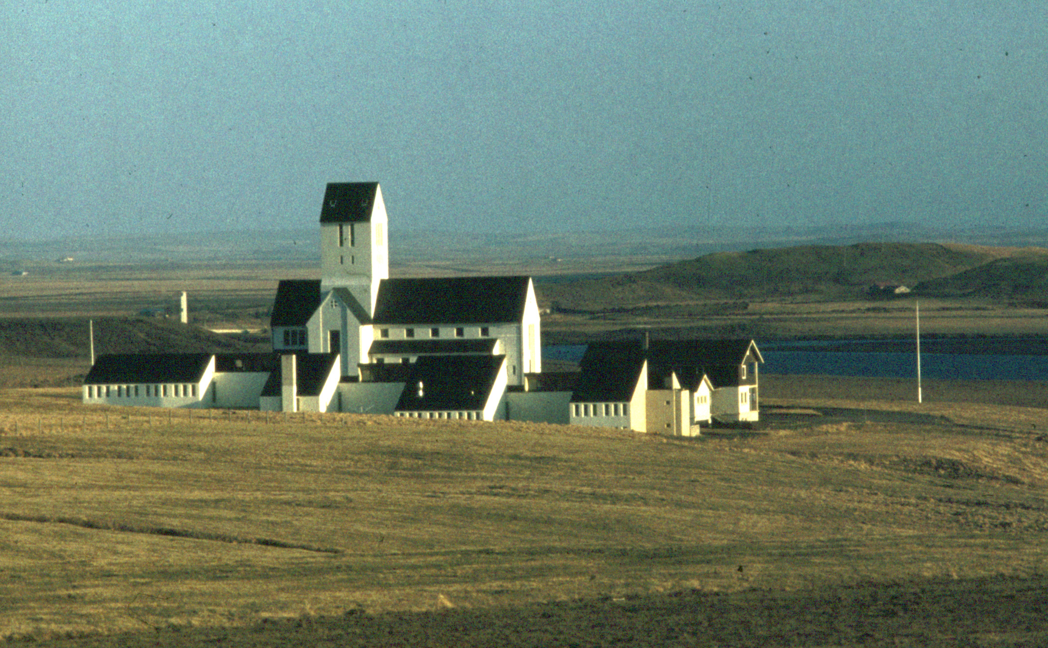 Skálholt